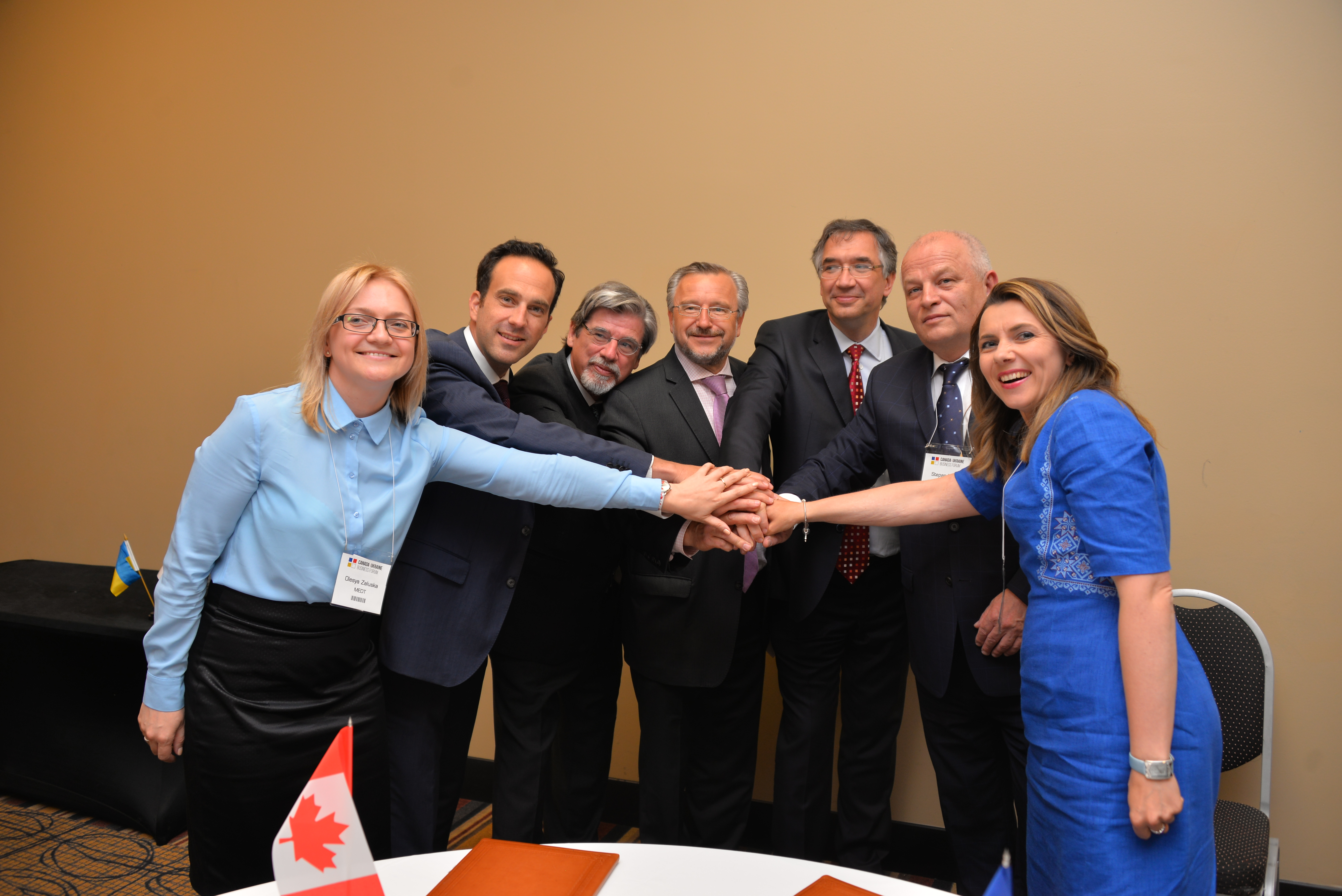 Підписання робочого варіанту Угоди про вільну торгівлю між Канадою і Україною в рамках Канадсько-українського інвестиційного форуму в Торонто 20 червня 2016. Зліва направо: Олеся Залуська, Карім Моркос, Пол Дербі, Зенон Потічний, Роман Ващук, Степан Кубів та Наталія Микольська